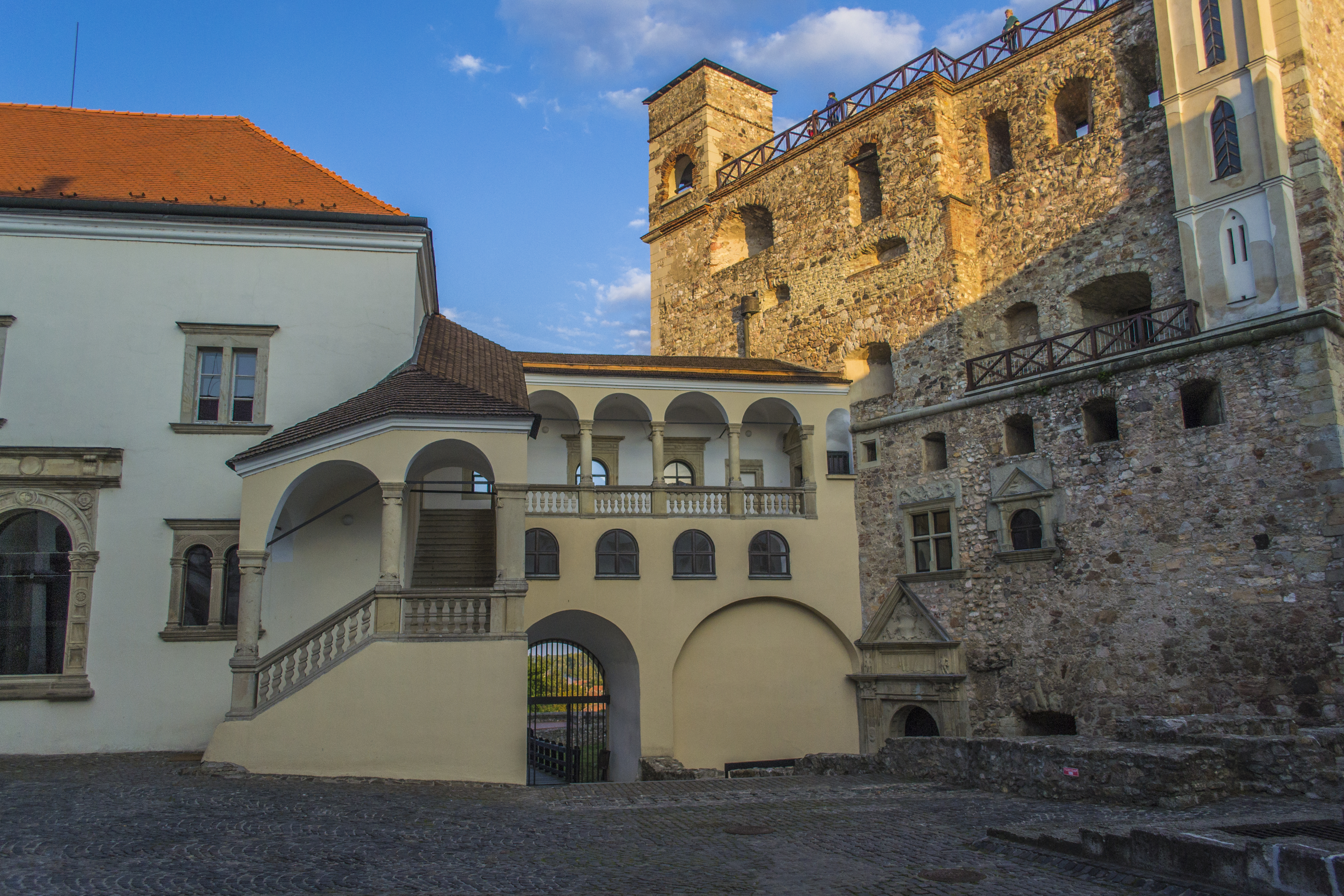 A Rákóczi-várkastély hátsó kijárata a Vörös-torony és a Lórántffy-loggia között This is a photo of a monument in Hungary. Identifier: 18069 This is a photo of a monument in Hungary. Identifier: 18071